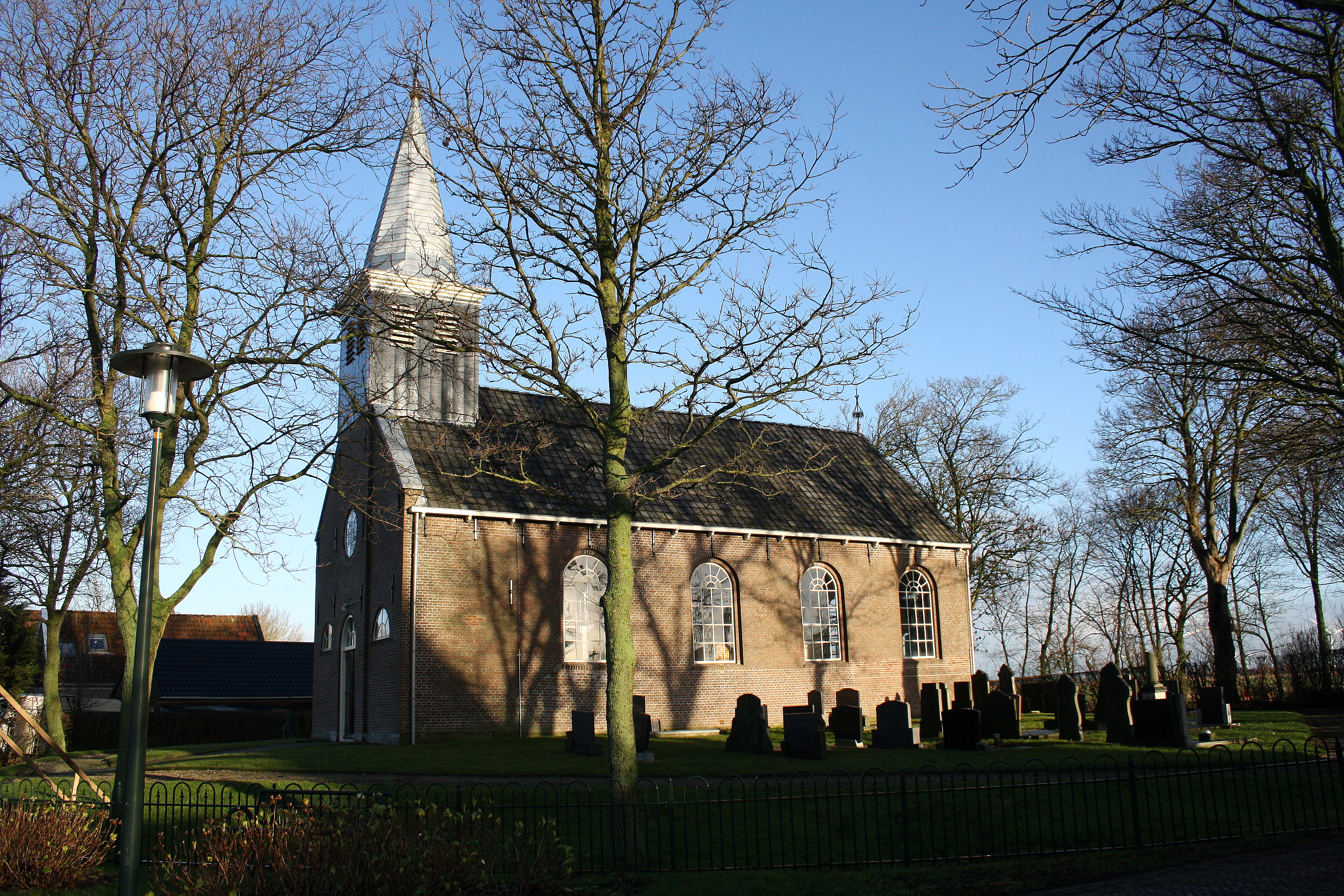 Idsegahuizum - Hervormde Kerk